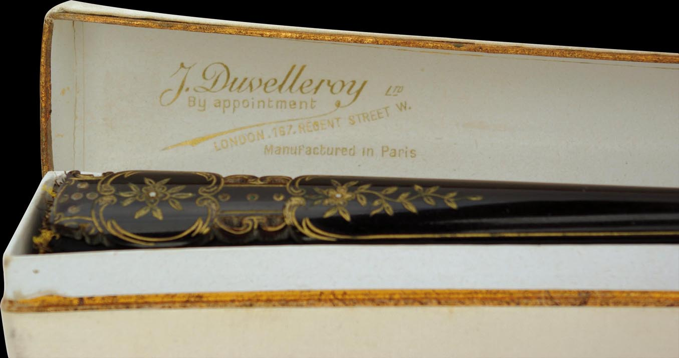 Ecrin Duvelleroy, fin XIXe s., pour éventail fabriqué à Paris et destiné à la succursale J. Duvelleroy Ltd, 167 Regent Street, London